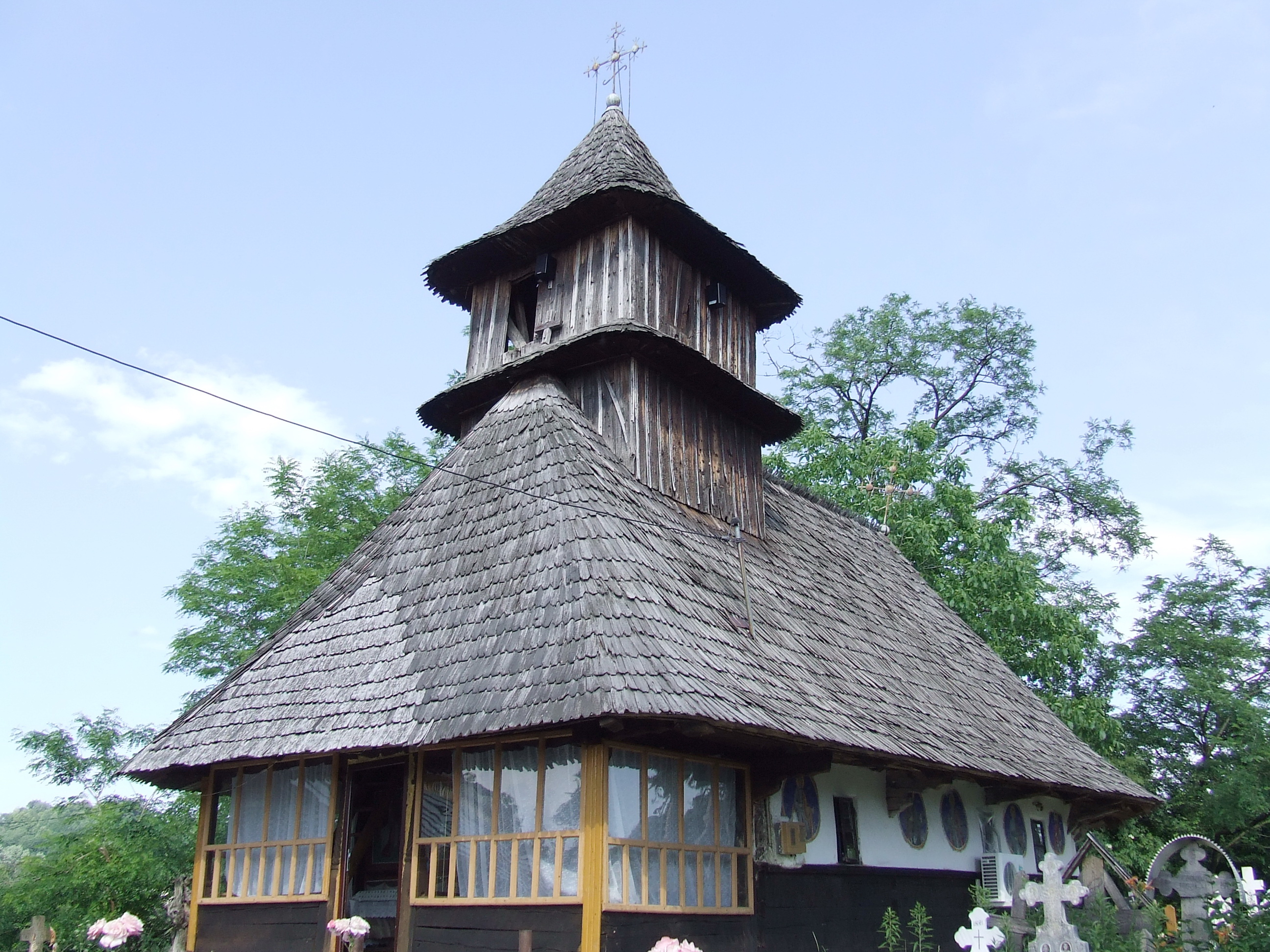 Biserica de lemn din Popești-Cacova, județul Vâlcea.